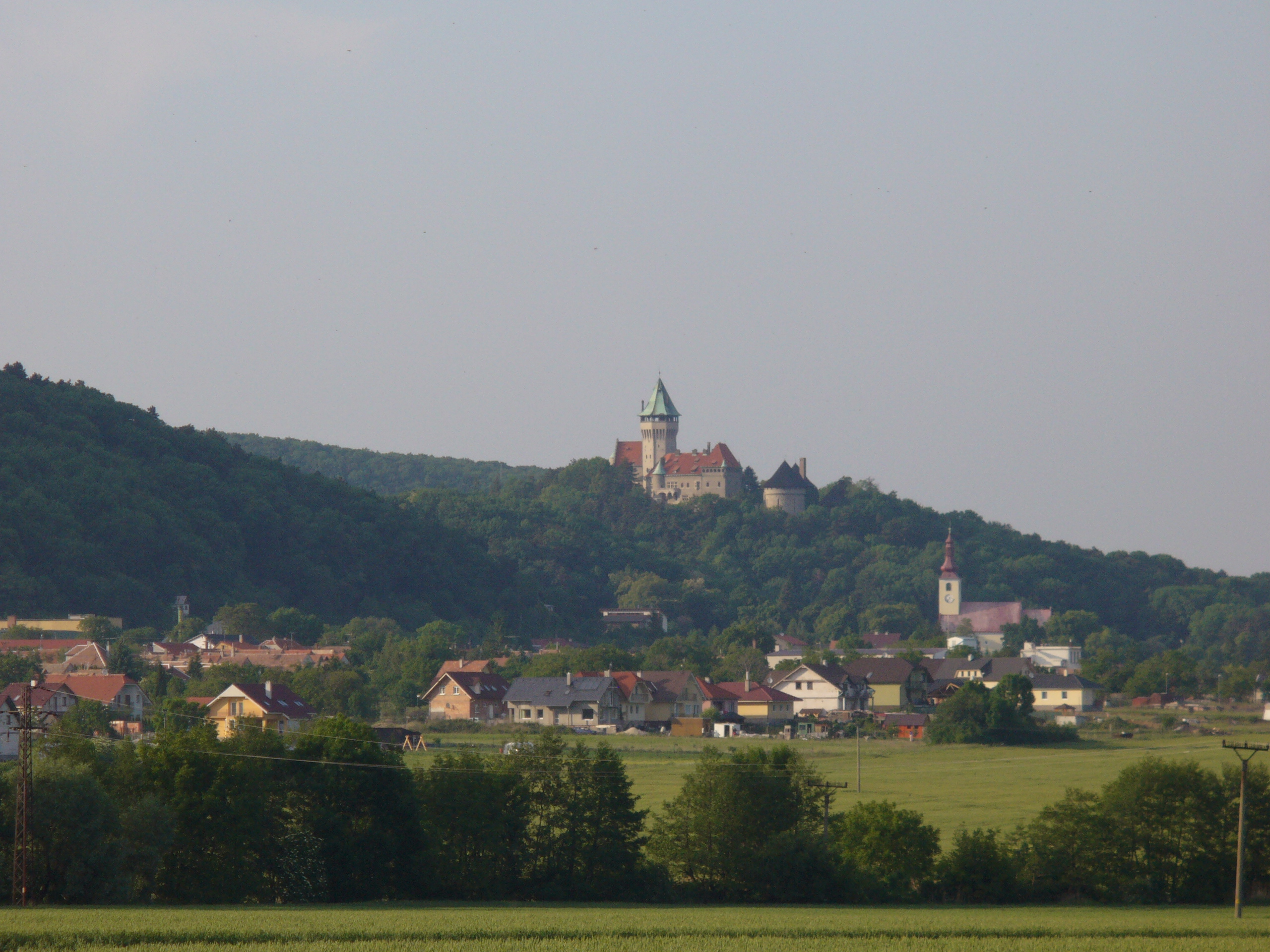 Smolenice and Smolenice Castle, Slovakia